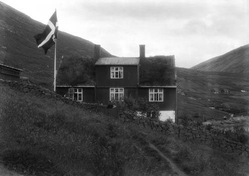 Vestmanna á Fitjunum, Faroe Islands